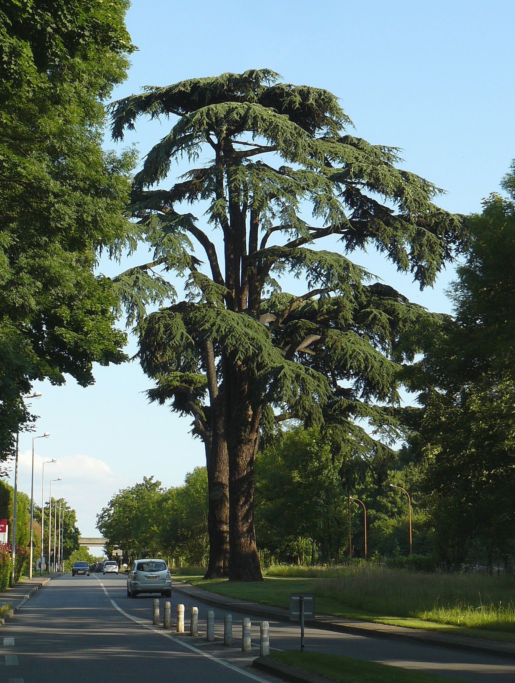 Les cèdres de Villebon (forêt de Meudon, Hauts-de-Seine, France)